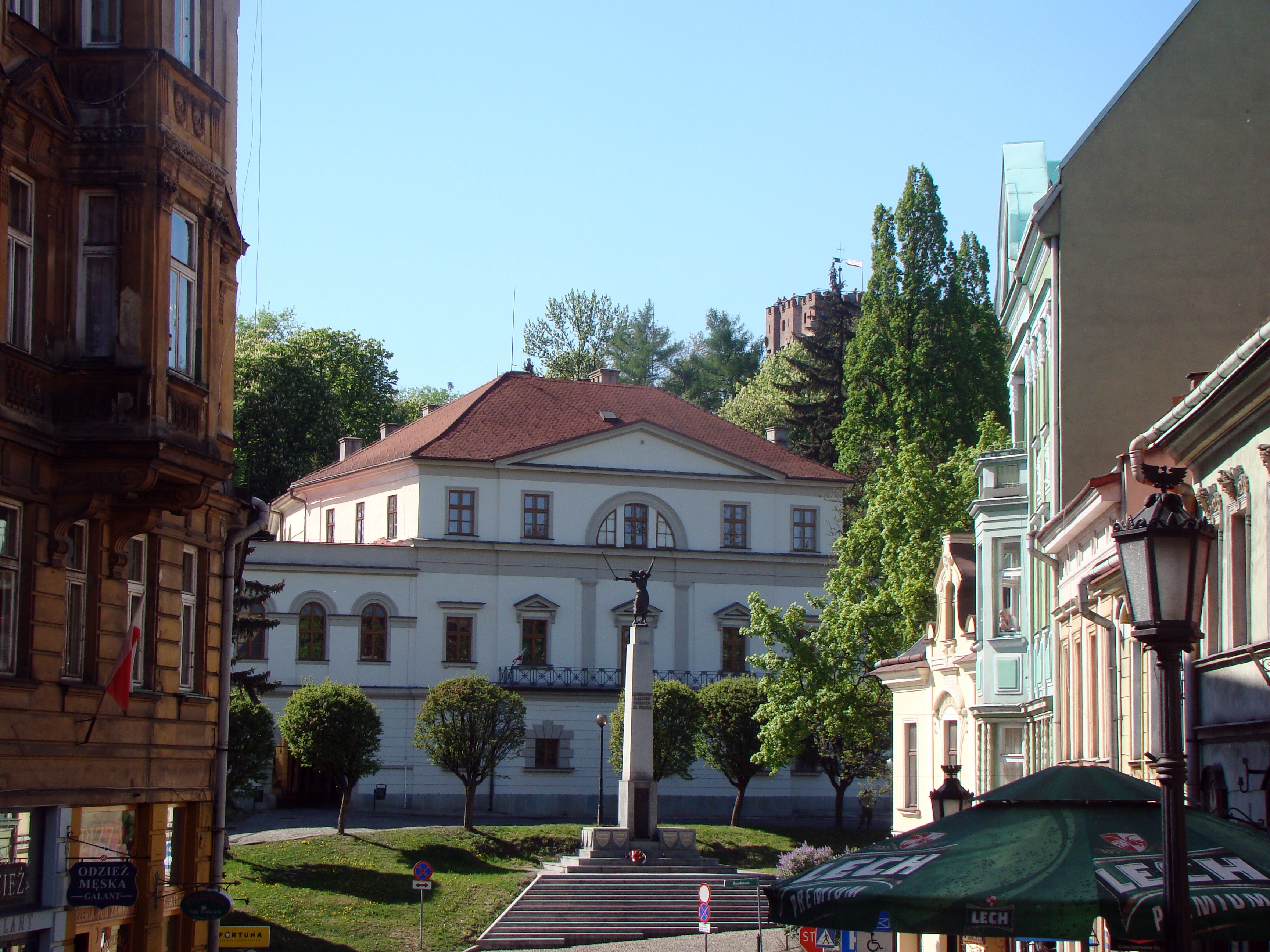 Cieszyn, Pałac Myśliwski Habsburgów, ob. Państwowa Szkoła Muzyczna, 1840